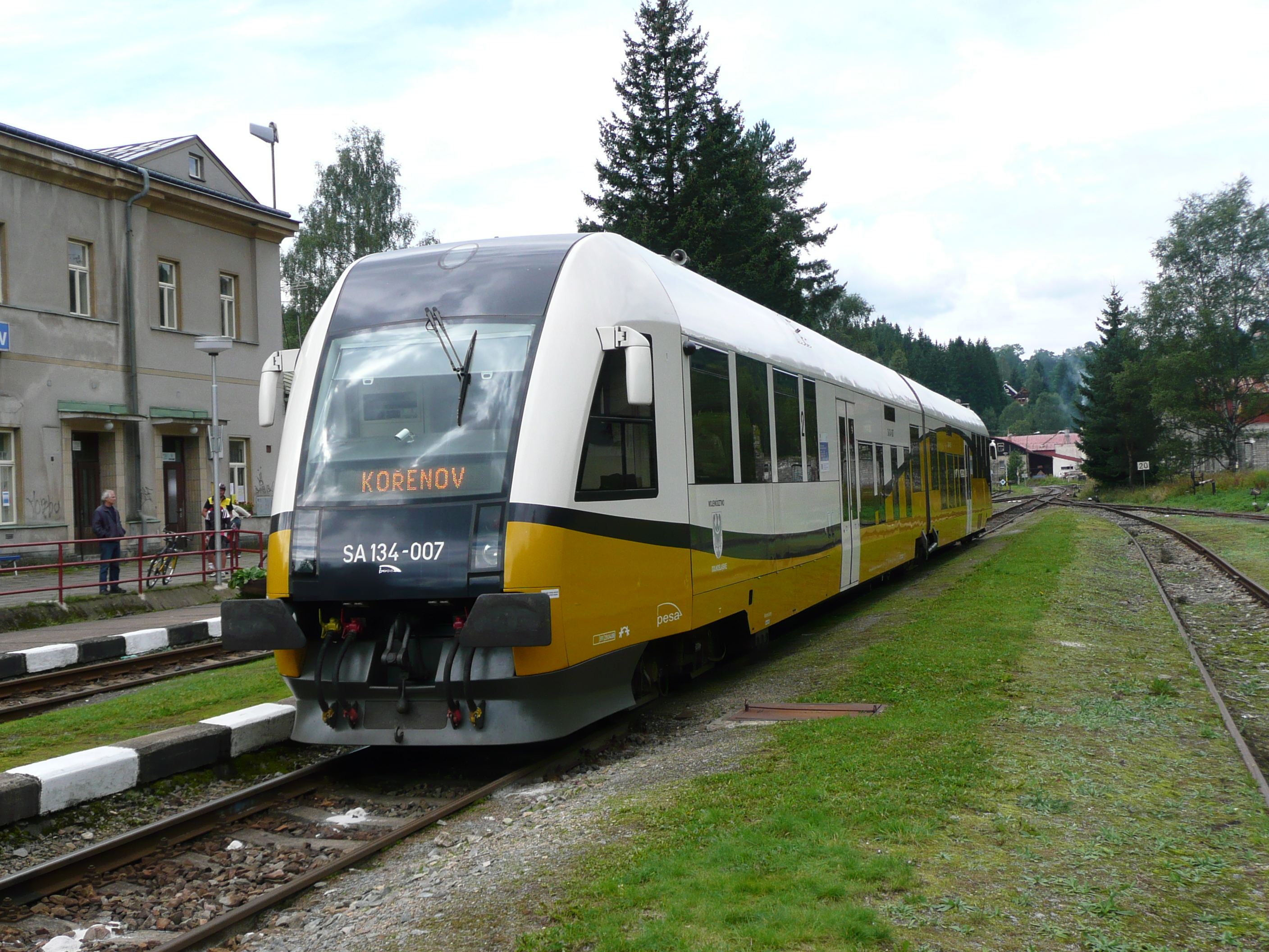 SA 134-007 am 04.09.2010 im Bahnhof Kořenov